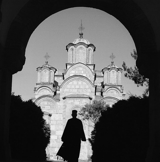 Косово и Метохија: Српски православни манастир Грачаница. Фотографије из пројекта "Корени душе". Фото:Дарко Дозет